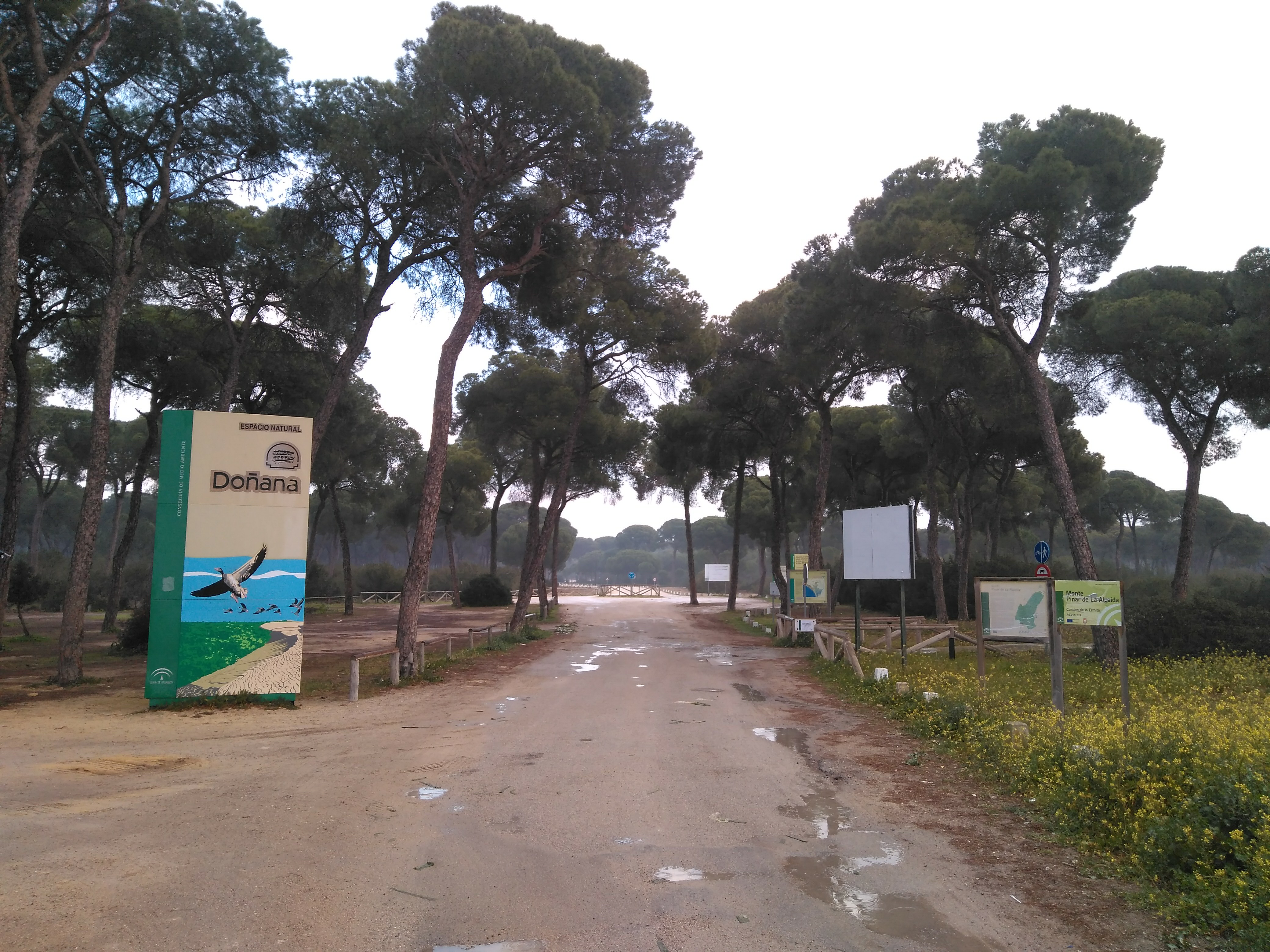 Entrada a el Pinar de La Algaida desde el poblado (Sanlúcar de Barrameda)